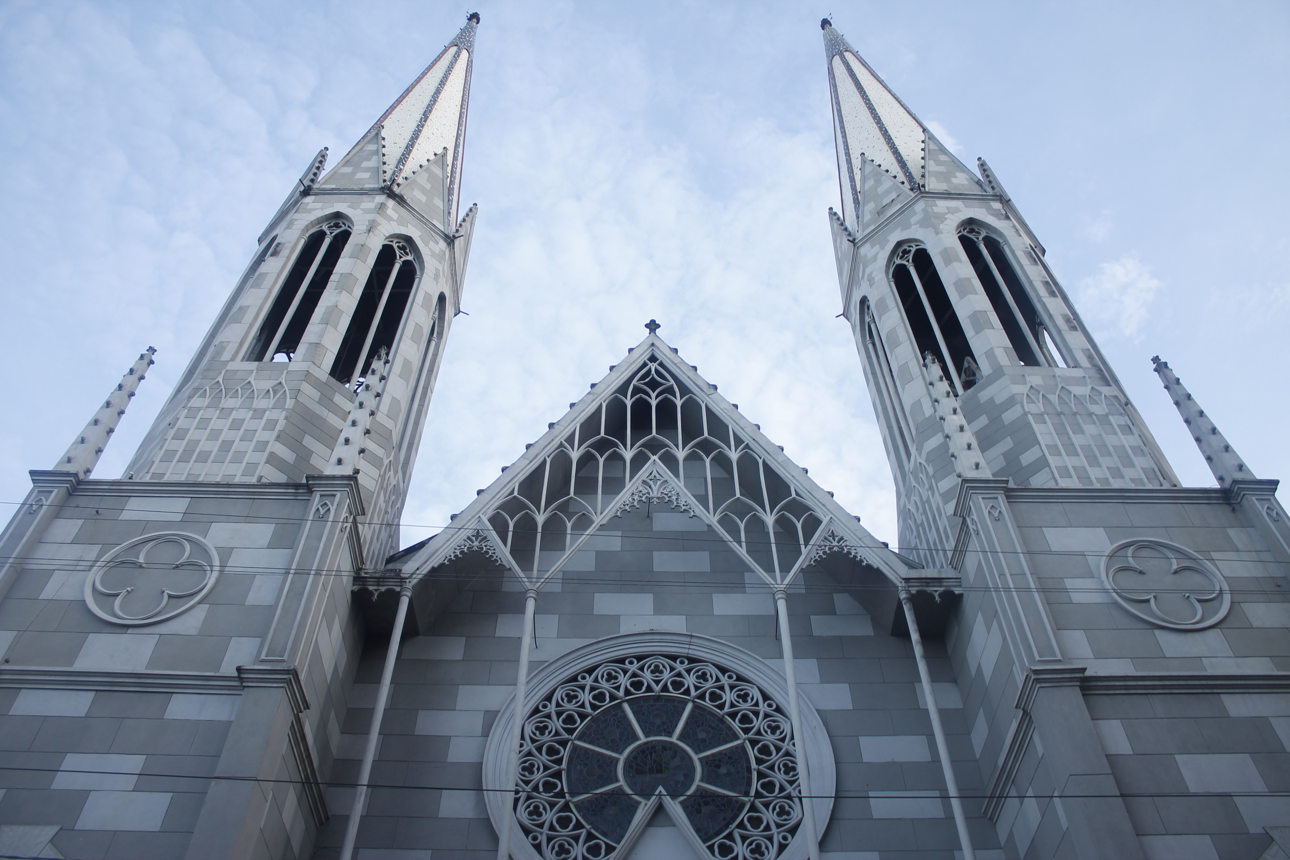 carr 16 con esquina calle 29